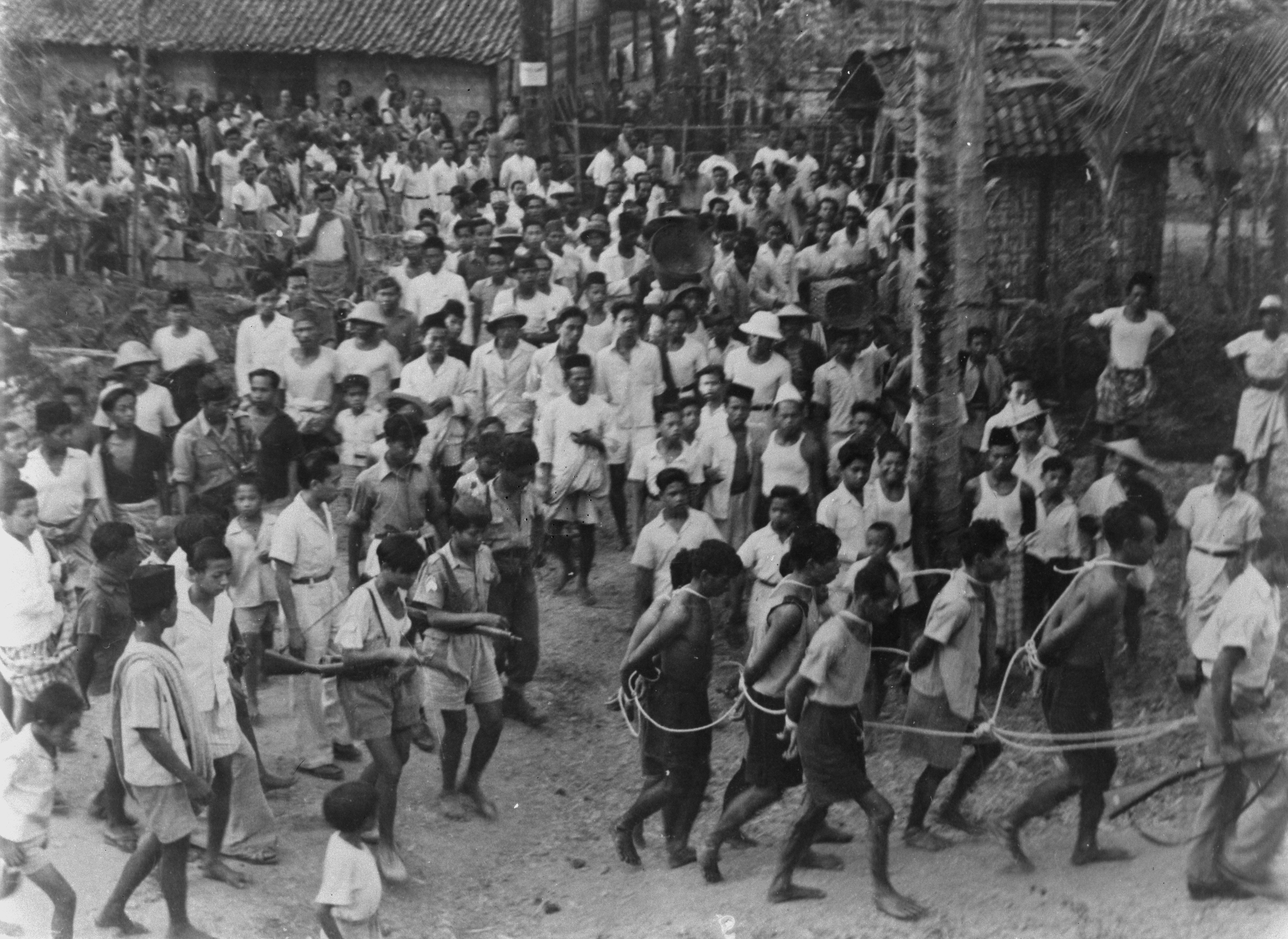 Collectie / Archief : Fotocollectie Dienst voor Legercontacten Indonesië Reportage / Serie : [DLC] Foto's gedode communisten door de TNI [gemaakt te Madioen, september 1948] Beschrijving : Groep IIndonesische mannen wordt met touwen geboeid en onder bewaking afgevoerd . Inwoners kijken toe Datum : september 1948 Locatie : Indonesië, Madiun, Nederlands-Indië Fotograaf : Fotograaf Onbekend / DLC Auteursrechthebbende : Nationaal Archief Materiaalsoort : Negatief (zwart/wit) Nummer archiefinventaris : bekijk toegang 2.24.04.02 Bestanddeelnummer : 8806